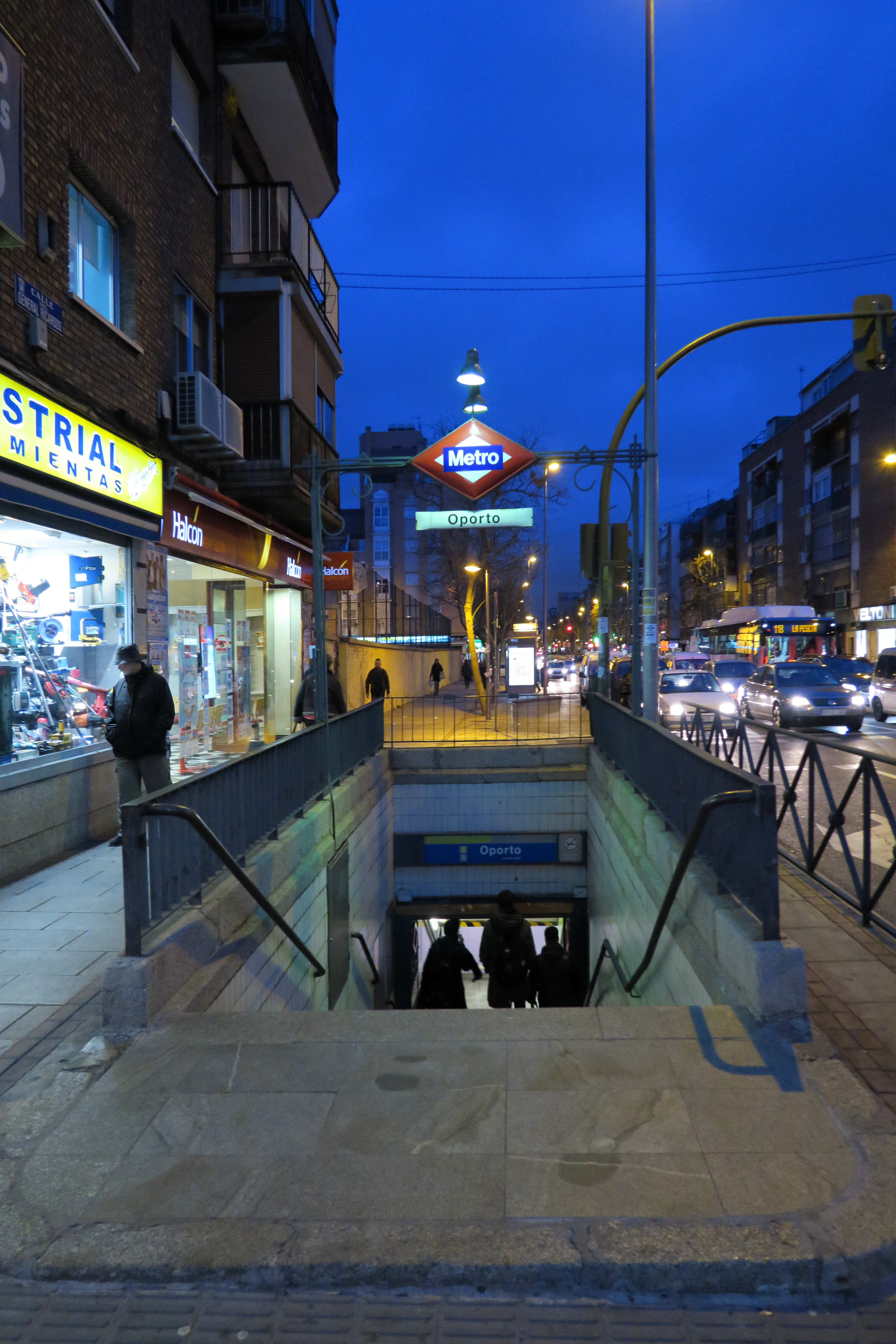 Estación de Oporto